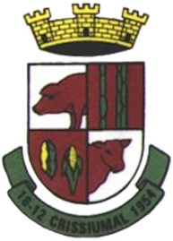 brasão crissiumal